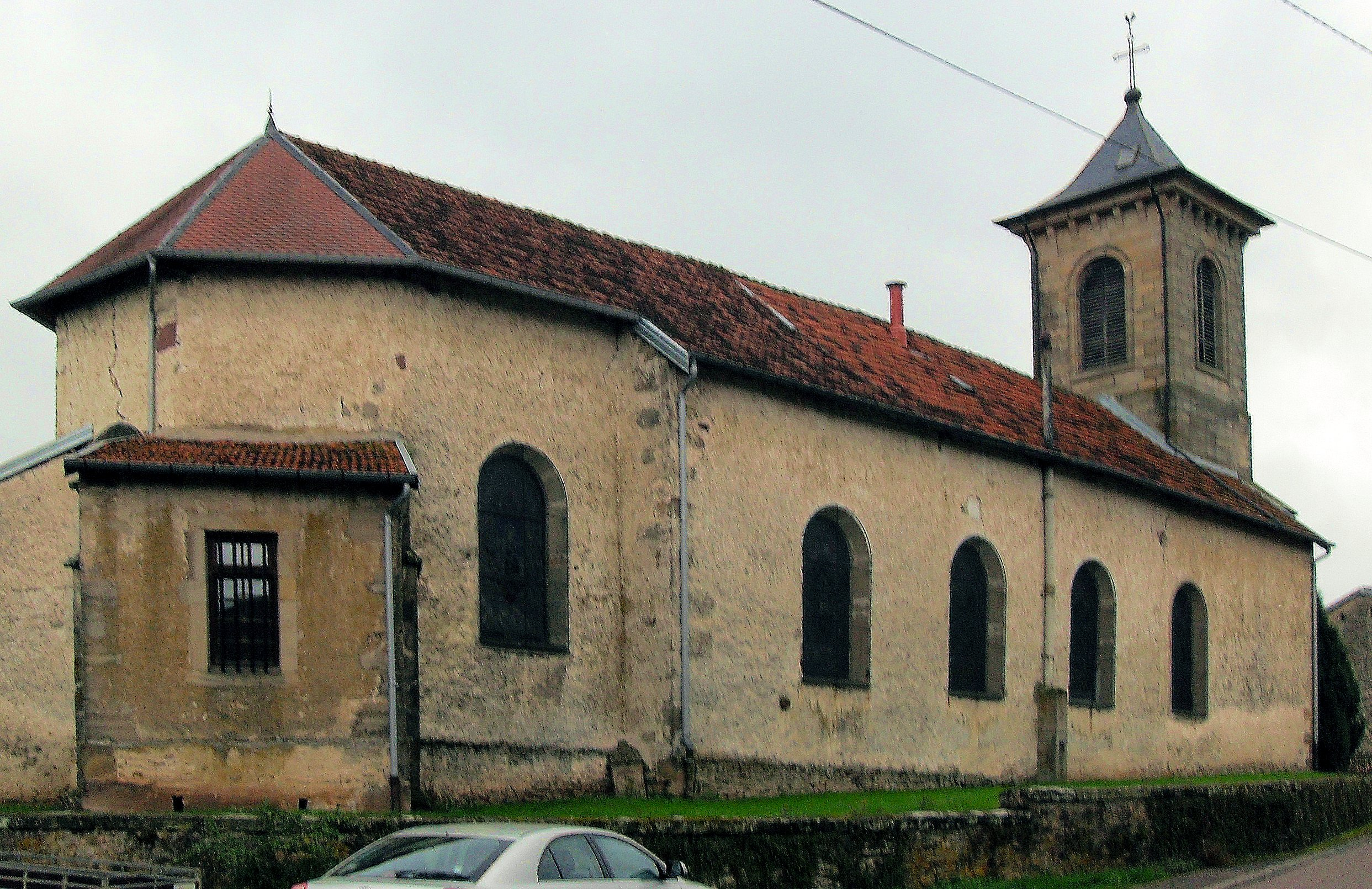 L'église Sainte-Madeleinede Pierrefitte